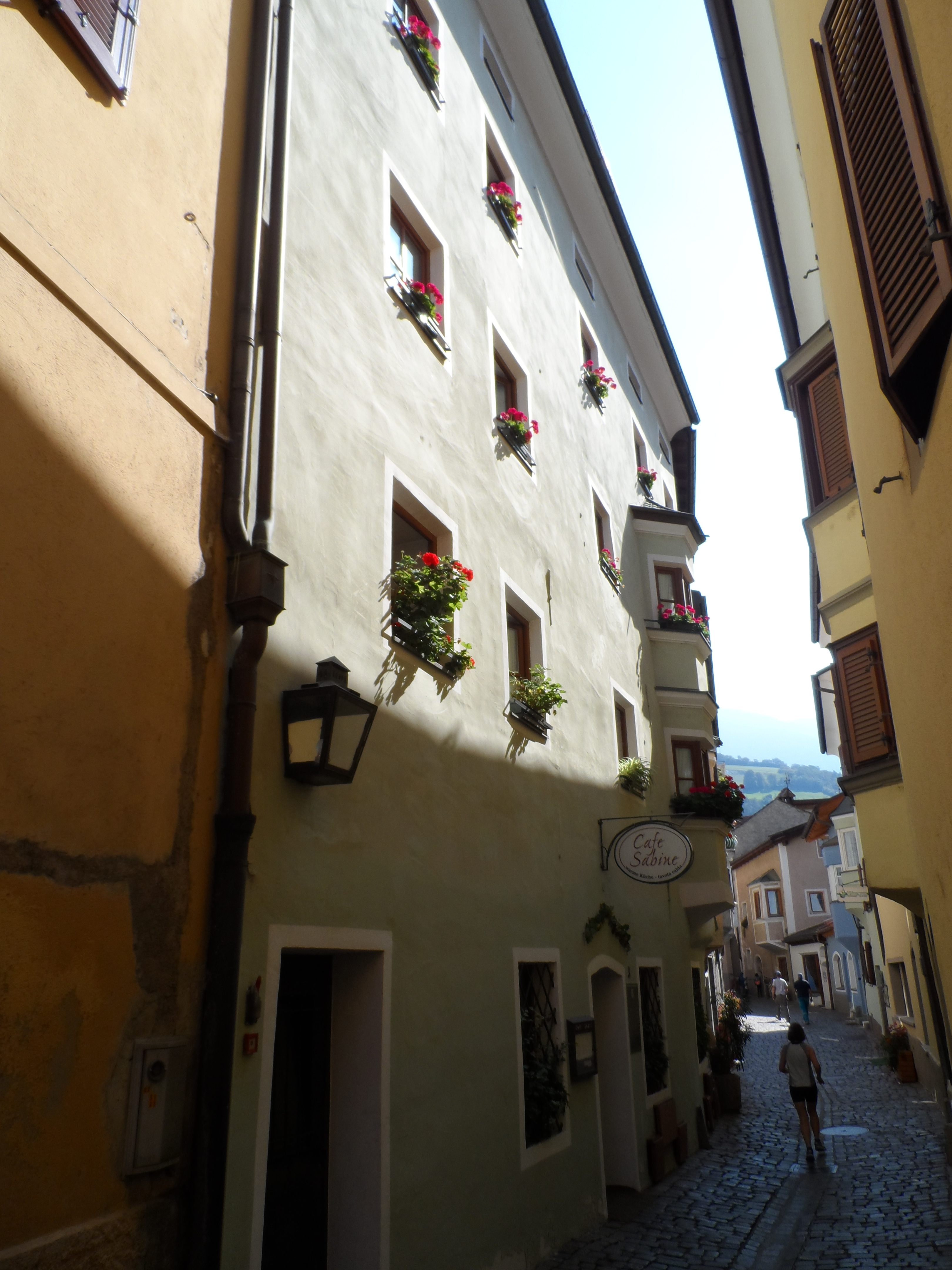 Städtisches Wohnhaus - Untere Schutzengelgasse 3, Brixen